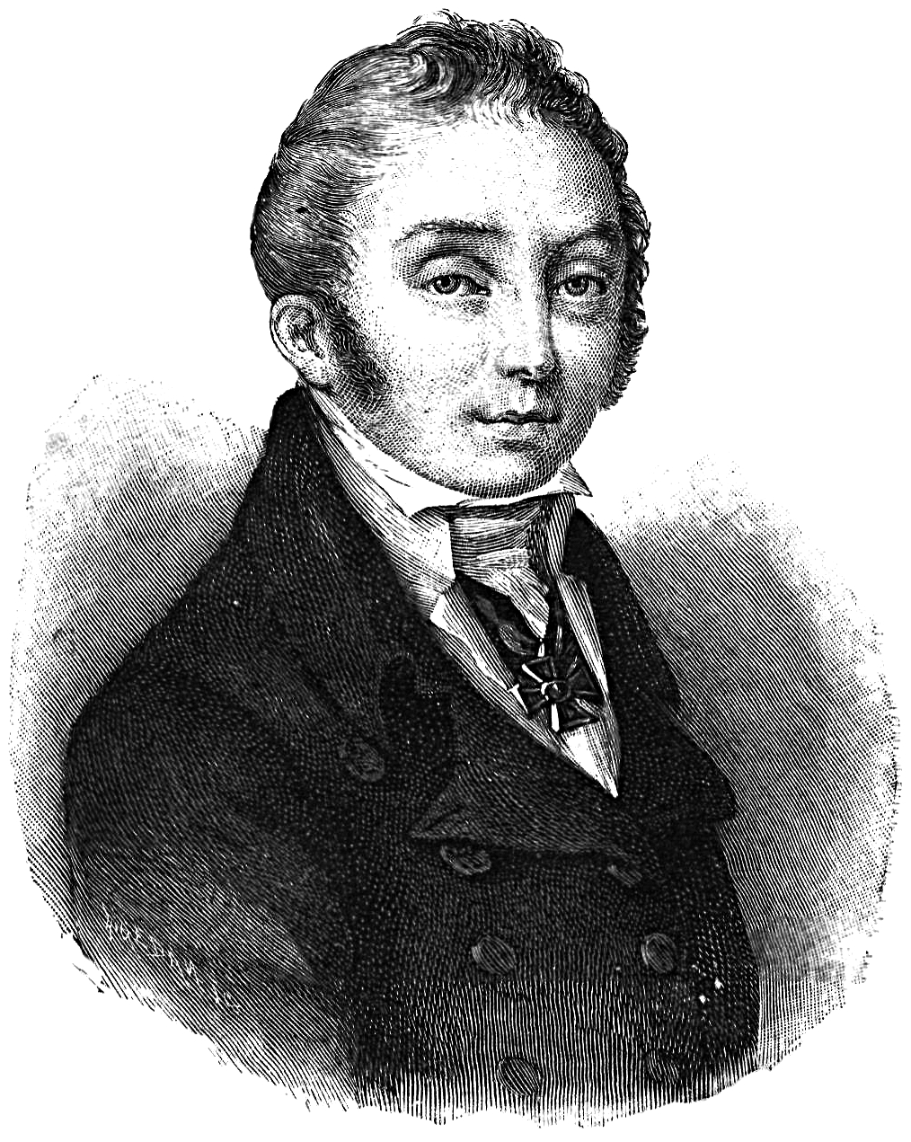 М. М. Сперанский. Гравюра c портрета П. А. Иванова (1806)